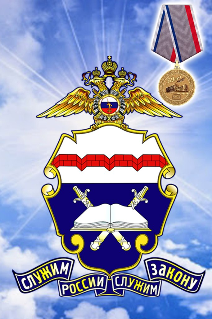 omamvd95